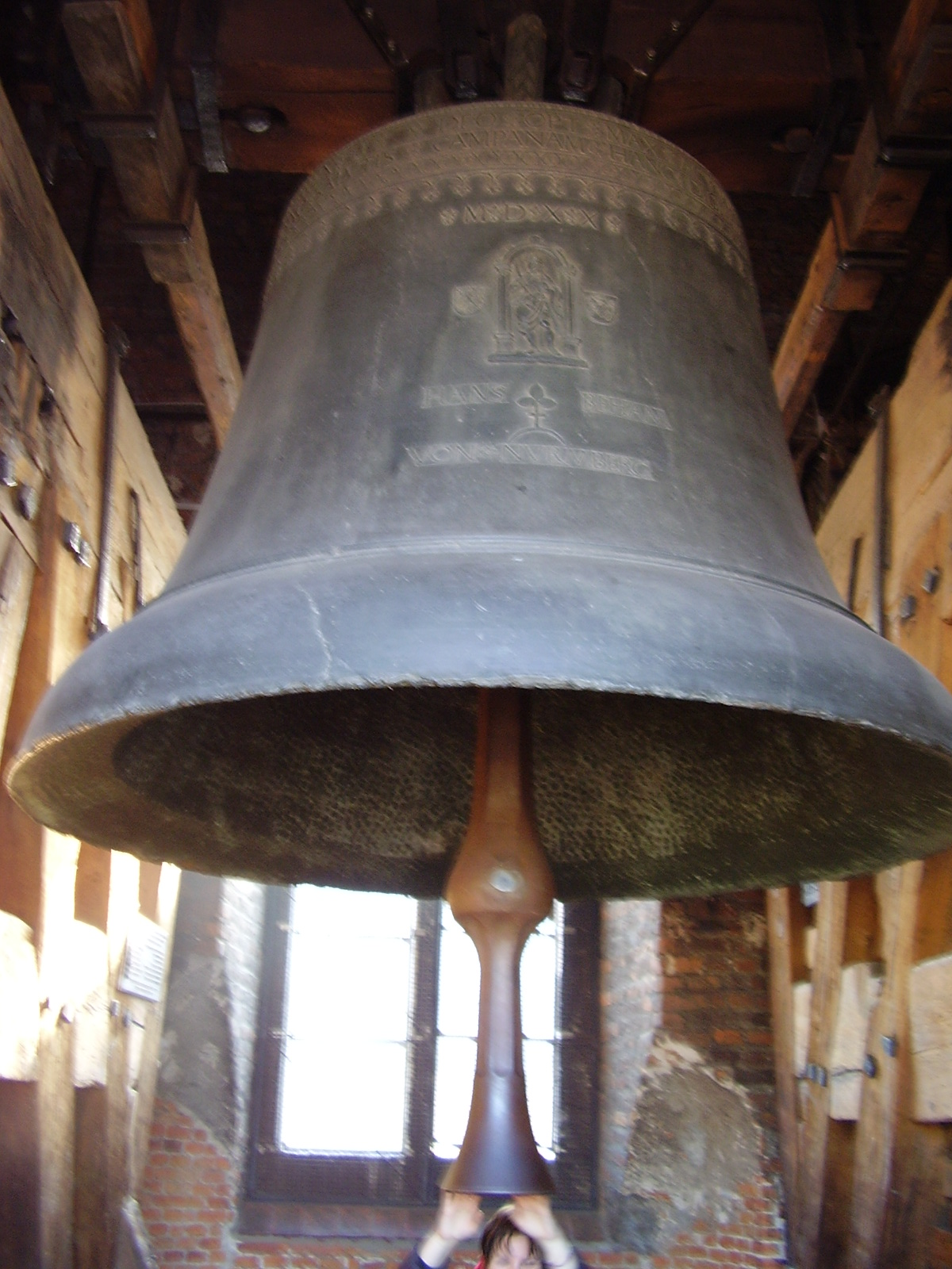 Krakow